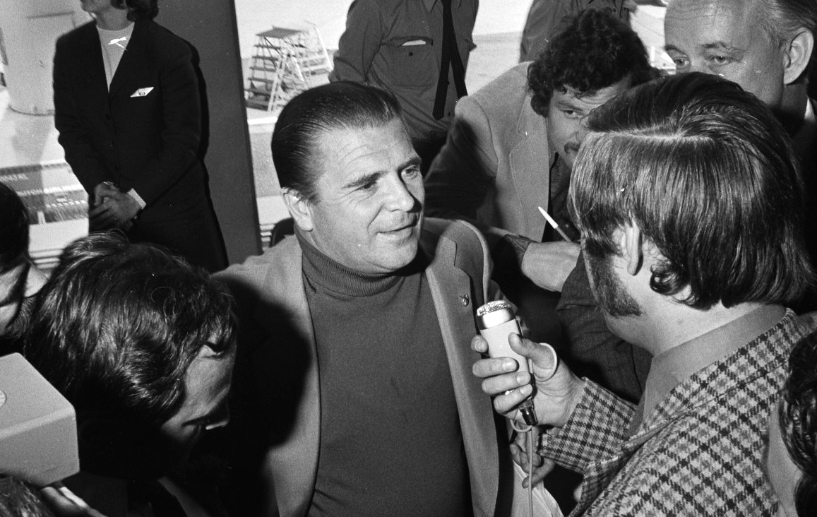 Puskás Ferenc a Panathinaikósz edzője ujságírók gyűrűjében